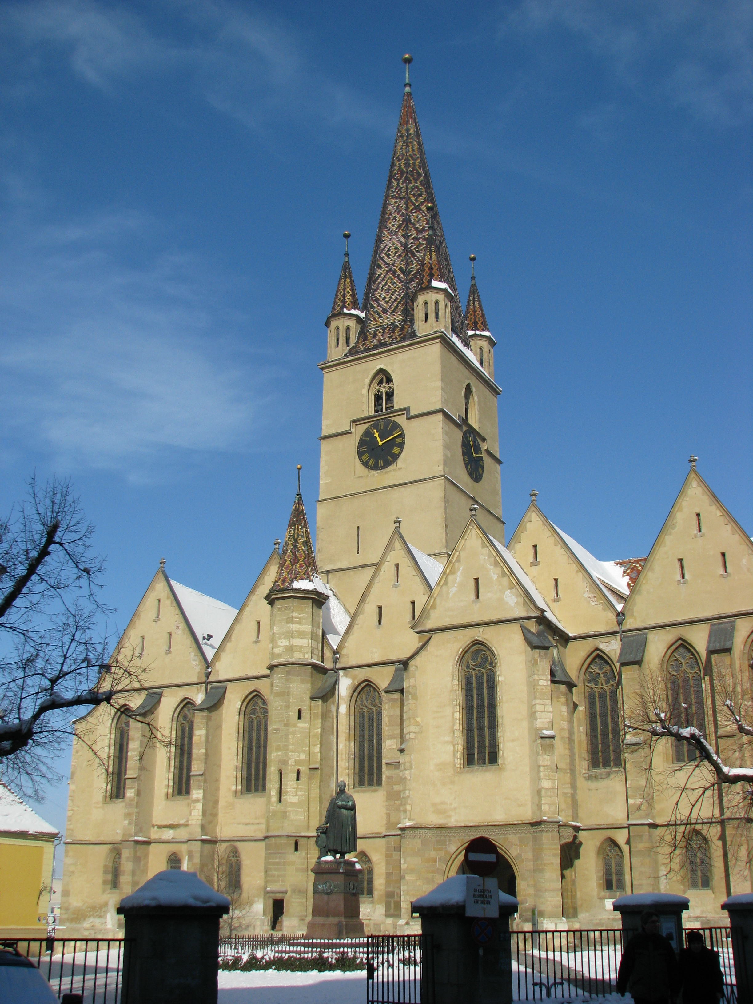 Biserica Evanghelica din Sibiu